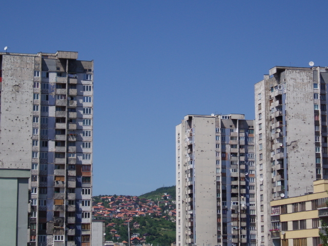 Novo Sarajevo. Slika: Asim Led (HarunB)